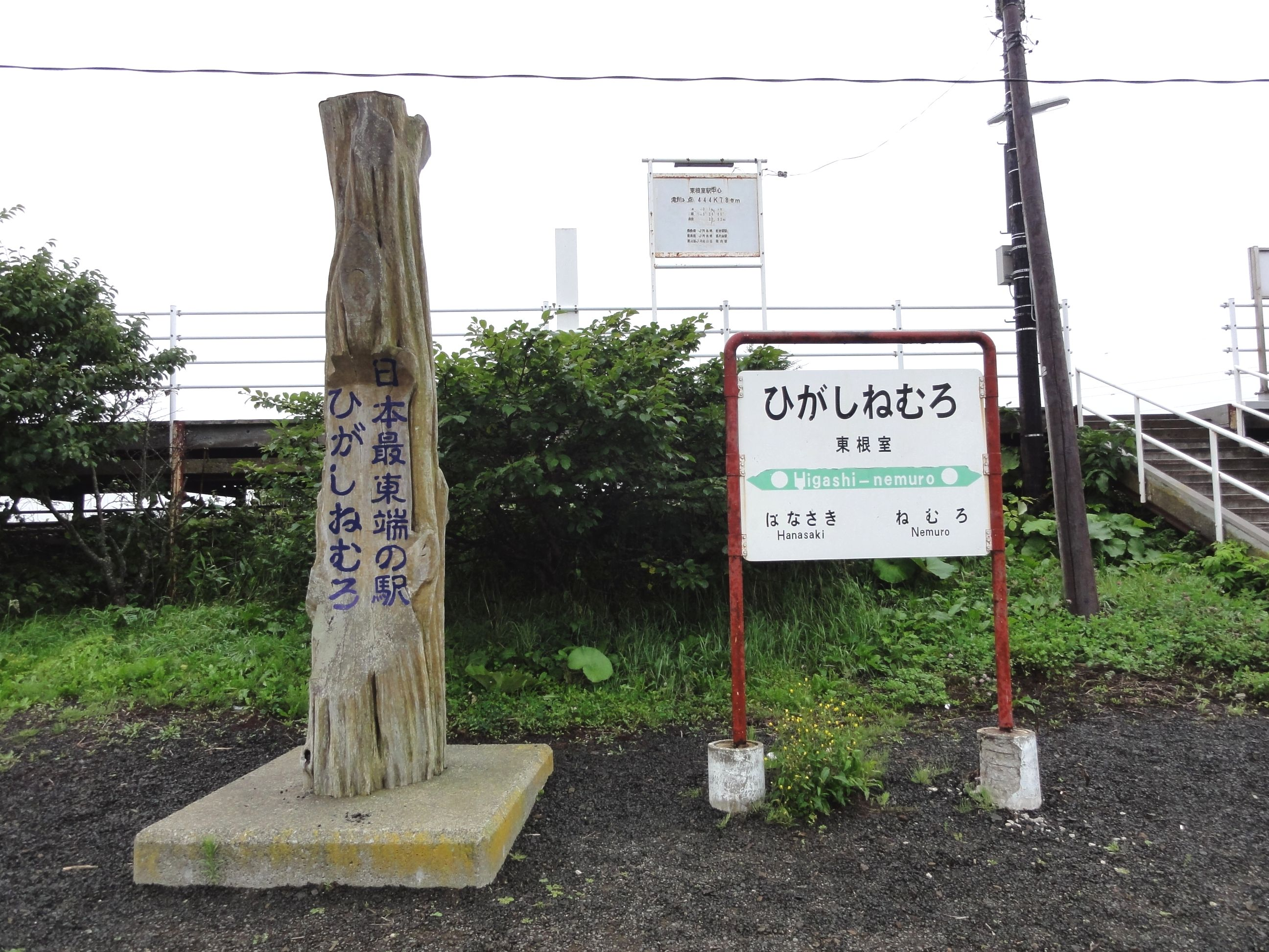 東根室駅前の日本最東端の記念碑